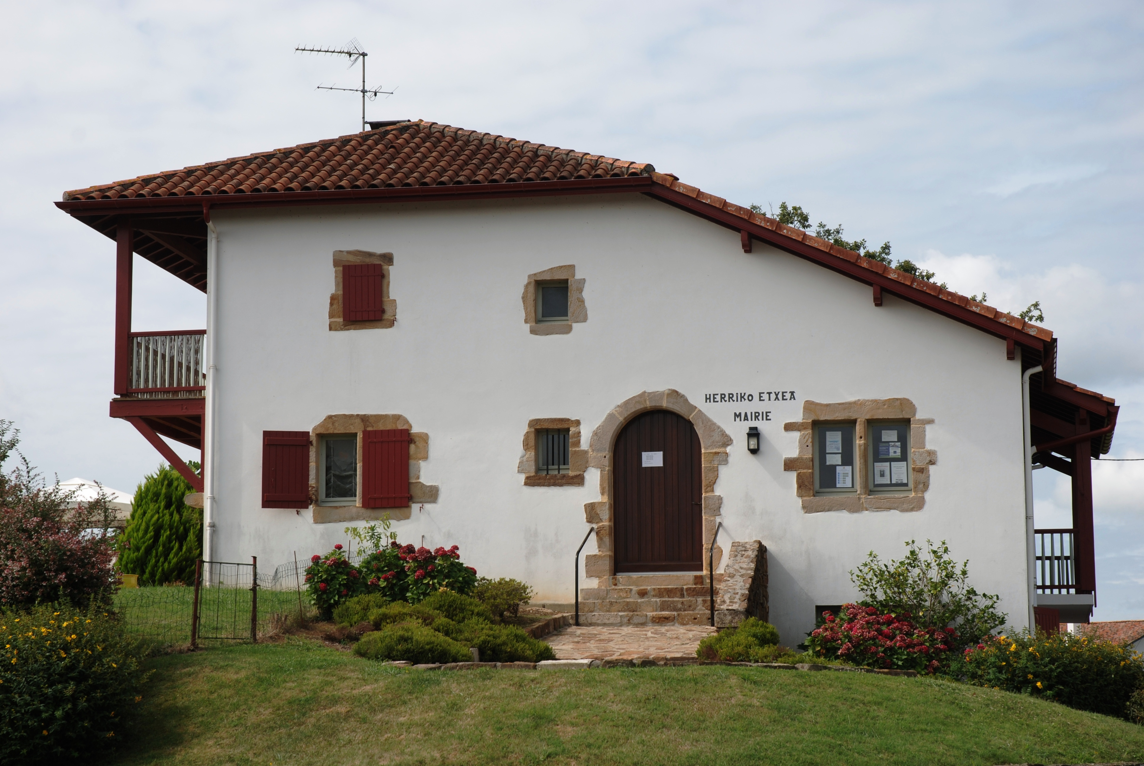 La mairie de Masparraute